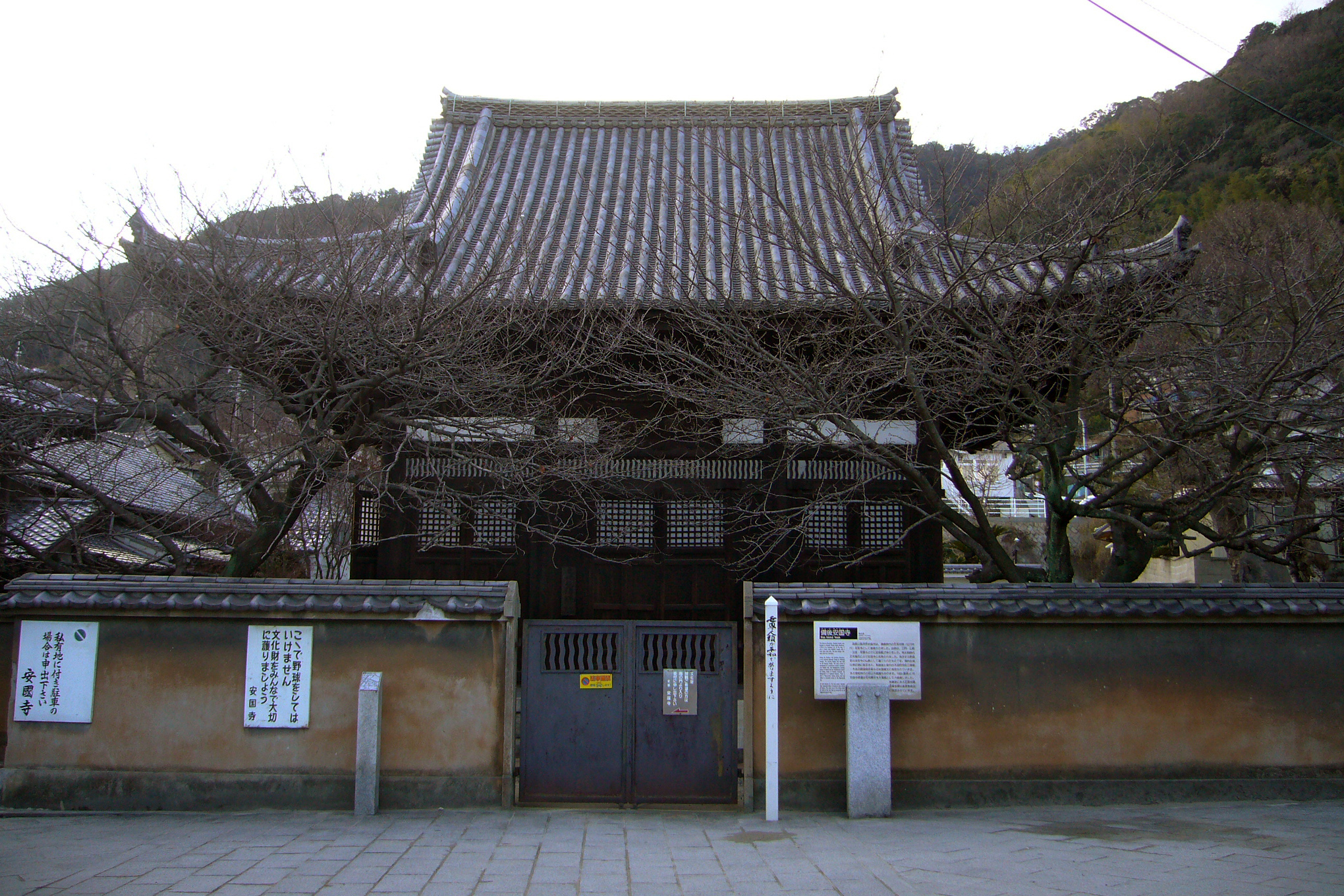 Ankokuji, Fukuyama, Hiroshima, Japan